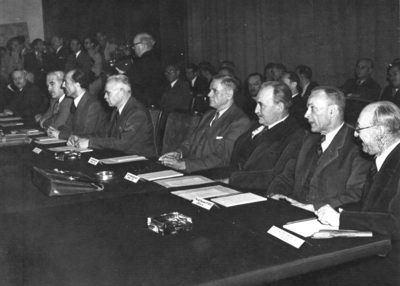 Frankfurt/Main, Frankfurter Konferenz Zentralbild/AP Frankfurter Konferenz am 1.7.1948 Im Hauptquartier der amerikanischen Besatzungstruppen in Frankfurt:Main trafen die drei Militärgouverneure der Westzonen mit den elf Ministerpräsidenten der Länder zusammen, um ihnen ihren Plan für eine deutsche Separatreinigung vorzulegen. U.B.z.: Am Konferenztisch sitzend v.l.n.r.: Leo Wohleb, Baden; Dr. Hans Erhard, Bayern; Wilhelm Kaisen, Bremen; Max Brauer, Hamburg; Christian Stock, Hessen; Karl Arnold, Nordrhein-Westfalen; Hinrich Kopf, Niedersachsen; Dr. Reinhold Maier, Württemberg-Baden. Abgebildete Personen: Wohleb, Leo: Staatspräsident von Süd-Baden, CDU, Gesandter in Portugal, Bundesrepublik Deutschland Brauer, Max: SPD, Völkerbund, Oberbürgermeister von Hamburg, MdB, Bundesrepublik Deutschland (PND 118673378) Stock, Christian: Ministerpräsident von Hessen, Bundesrepublik Deutschland (PND 118618296) Arnold, Karl: Ministerpräsident von Nordrhein-Westfalen (NRW), CDU, Bundesrepublik Deutschland Kopf, Hinrich Wilhelm Dr.: Ministerpräsident von Niedersachsen, Bundesrepublik Deutschland Maier, Reinhold Dr. jur.: MdB, Ministerpräsident von Baden-Württemberg, FDP, Bundesrepublik Deutschland (PND 118576410)